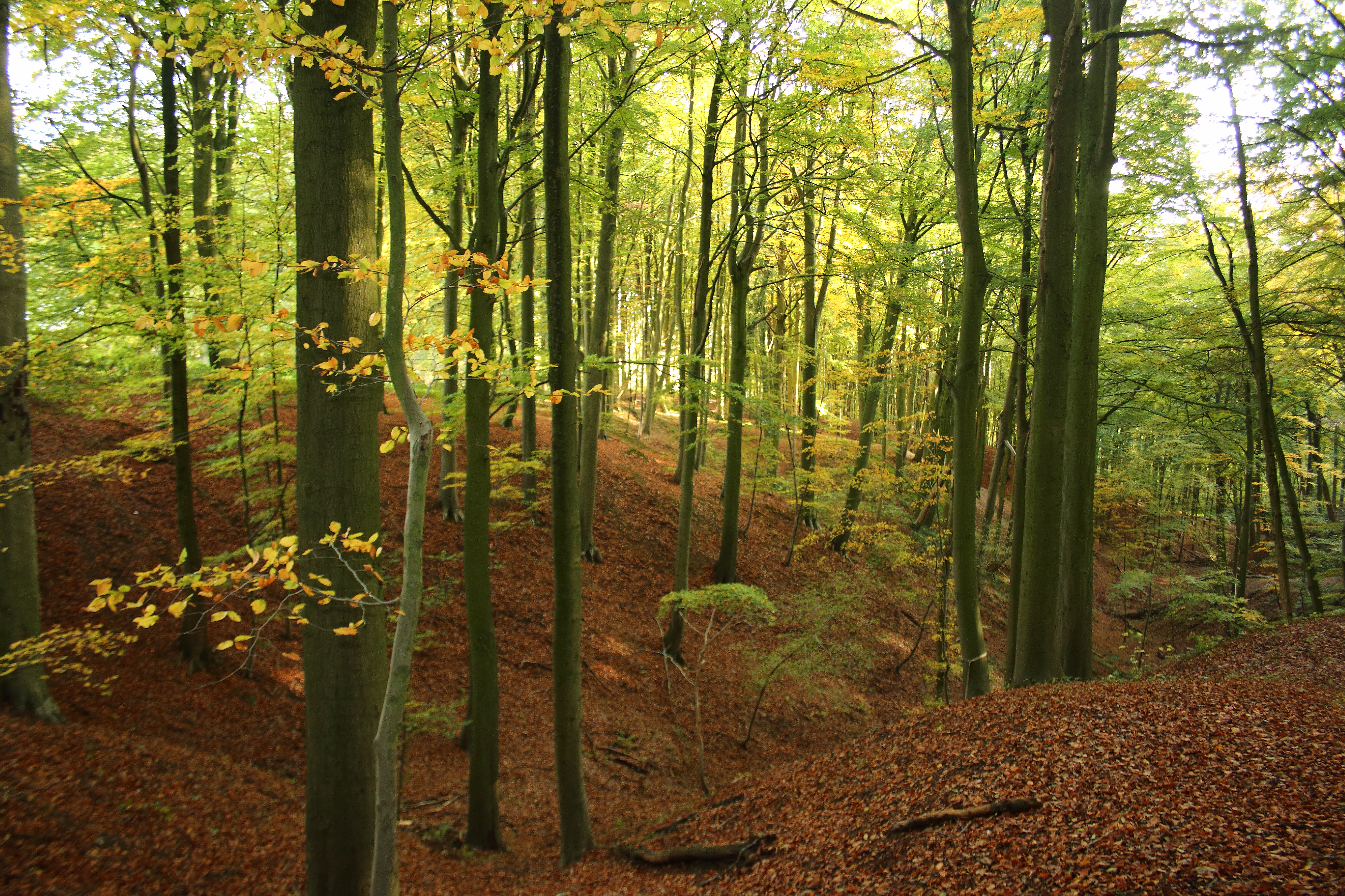 Neigembos, Ninove, Vlaanderen, België